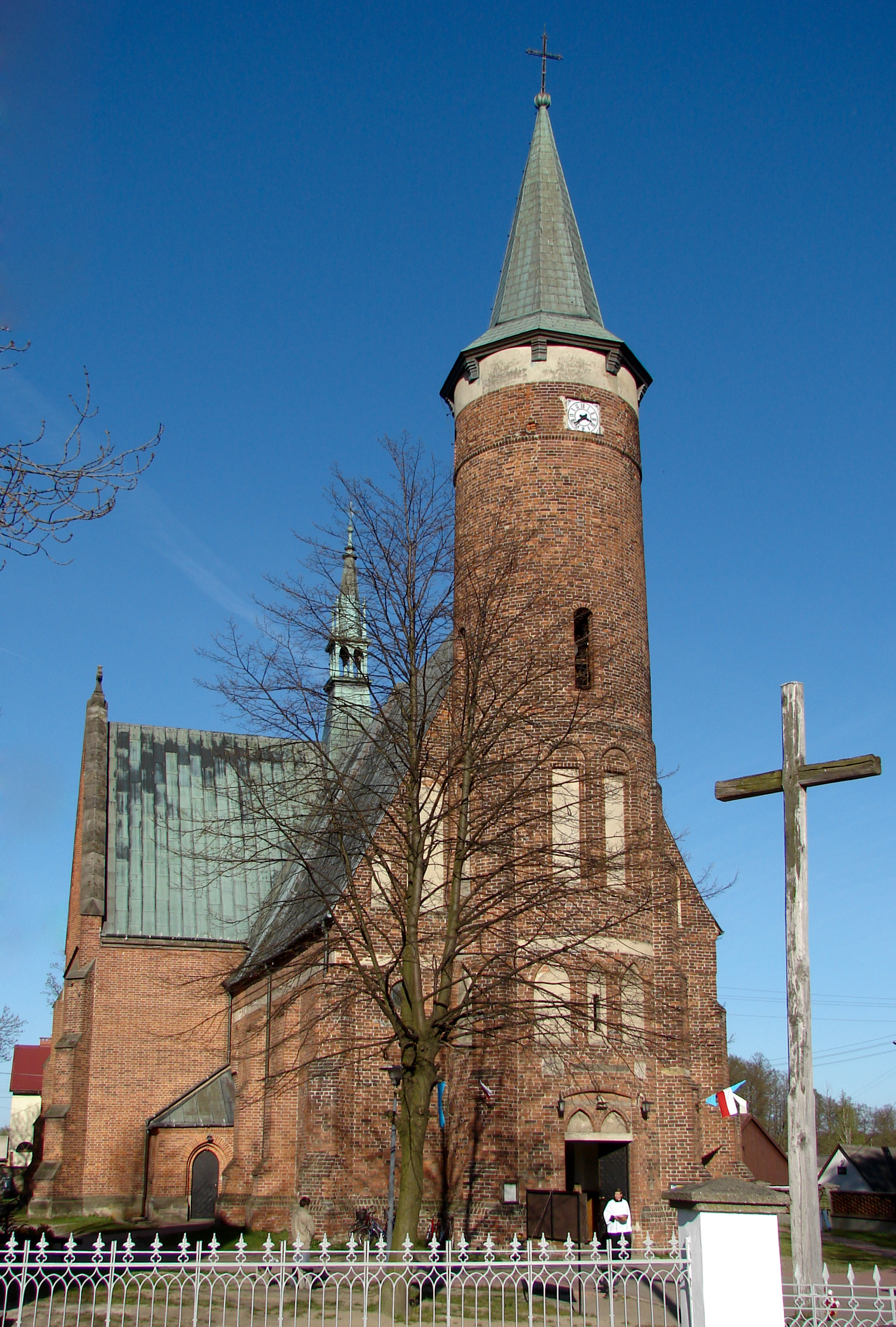 Kościół św. Łukasza w Drzewicy